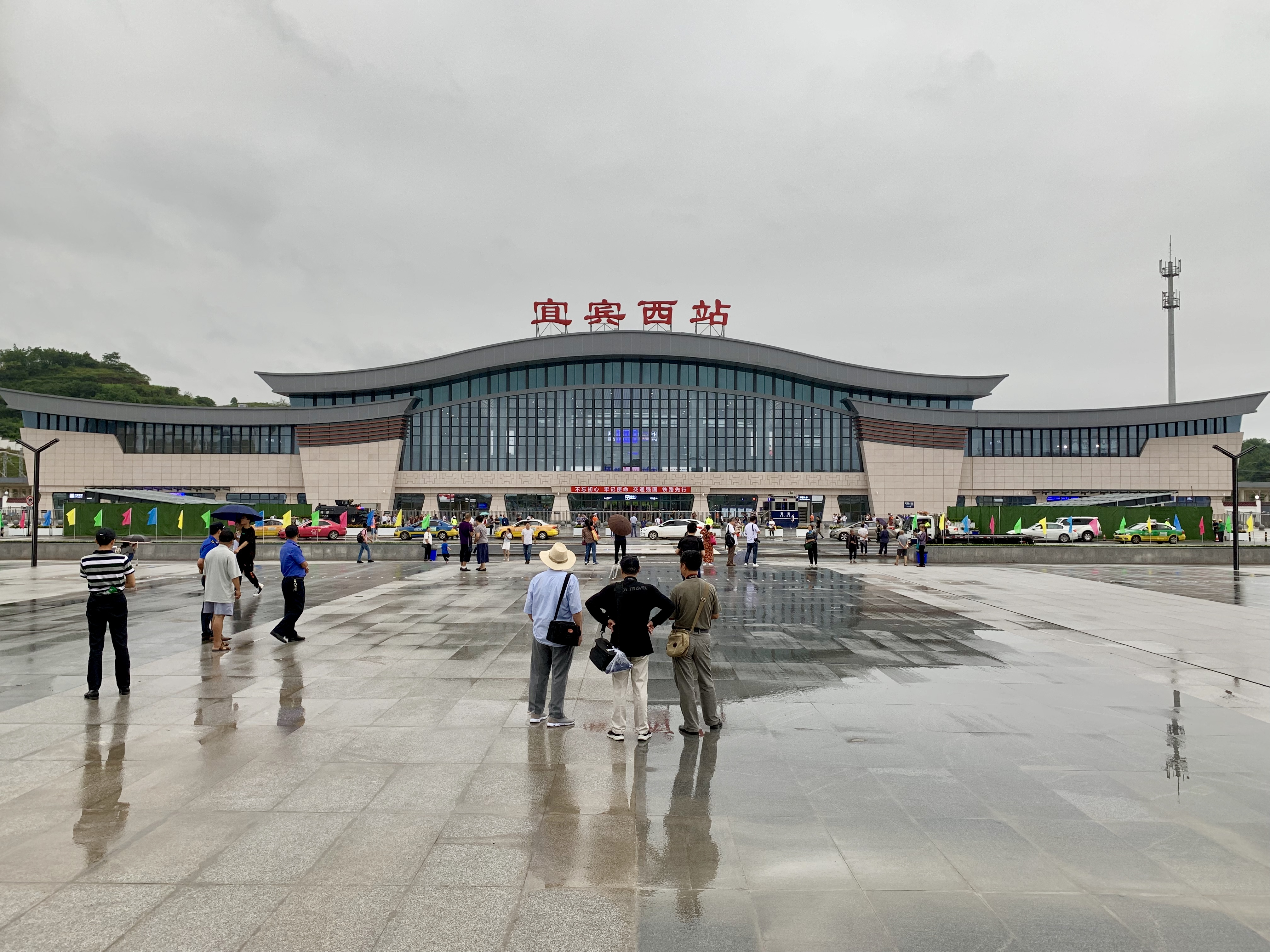 宜宾站在成贵客专乐宜段开通首日境况